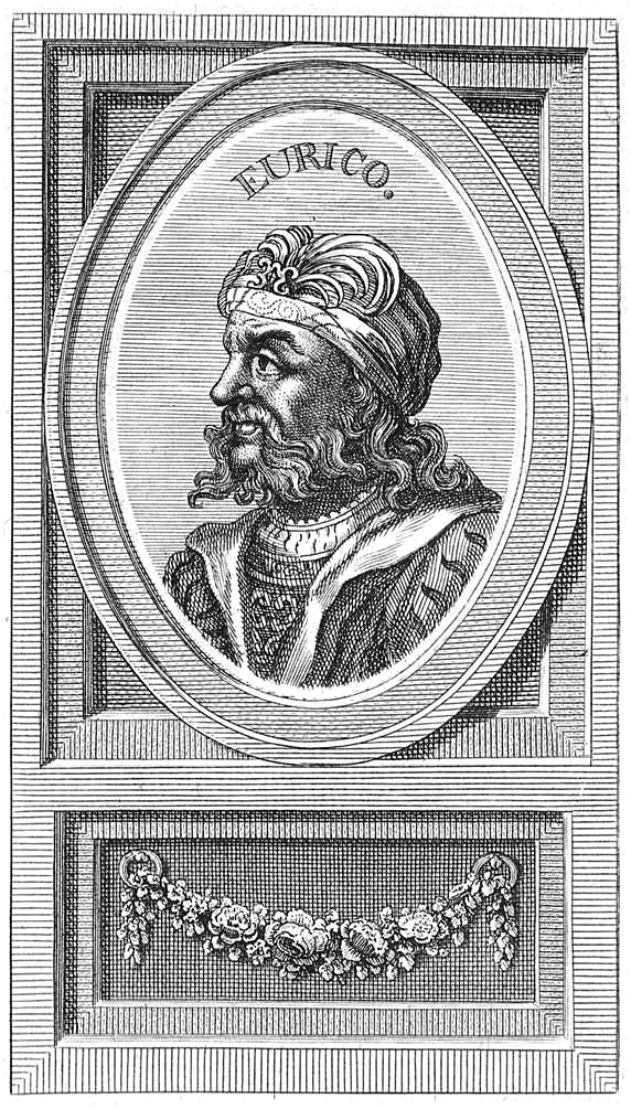 Reyes visigodos de Hispania. Retrato de Eurico